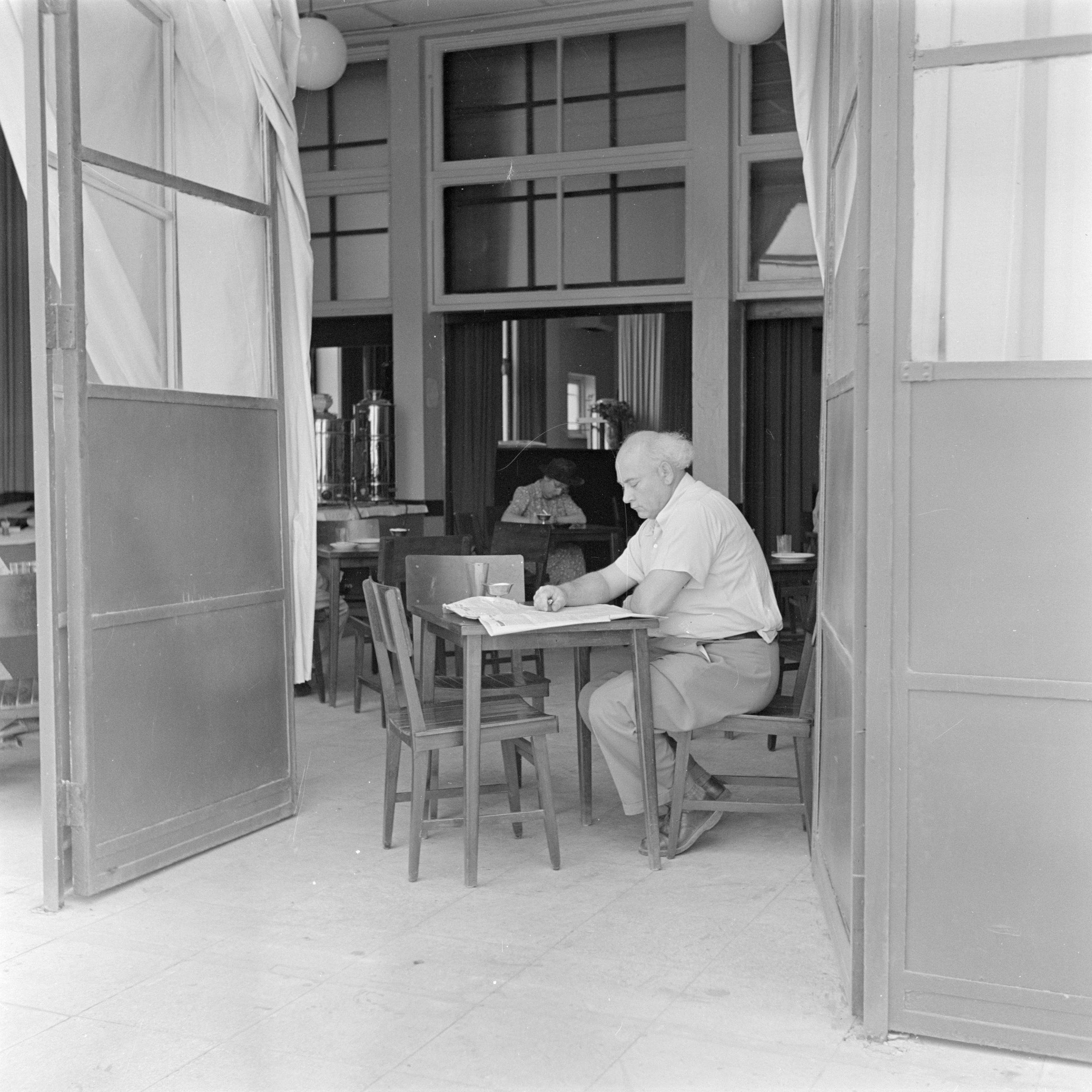 Collectie / Archief : Fotocollectie Van de Poll Reportage / Serie : Israel 1948-1949: Tel Aviv Beschrijving : Parlementslid in de kantine van de knesseth in Tel Aviv bij het lezen van een krant Datum : 1949 Locatie : Israël, Tel Aviv Trefwoorden : cafés, parlementariërs, parlementsgebouwen, politici Fotograaf : Poll, Willem van de Auteursrechthebbende : Nationaal Archief Materiaalsoort : Negatief (zwart/wit) Nummer archiefinventaris : bekijk toegang 2.24.14.02 Bestanddeelnummer : 255-1337